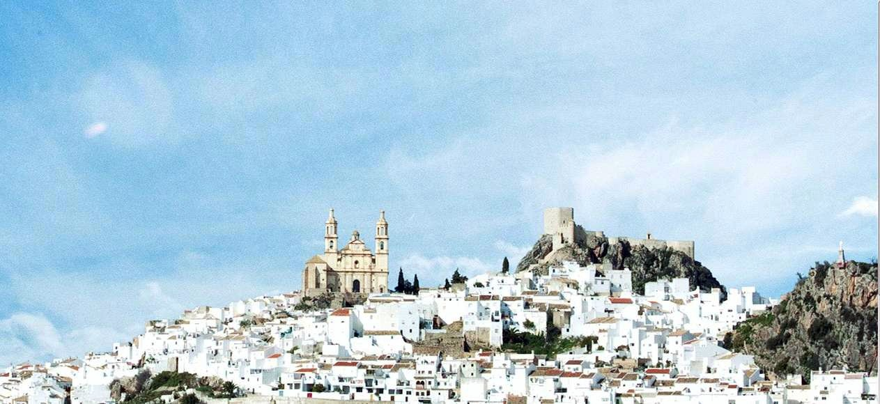 Vista parcial de Olvera, donde se puede apreciar algunos de sus principales monumentos, la Parroquia de la Encarnación, el Castillo Árabe y el Peñón del Sagrado Corazón